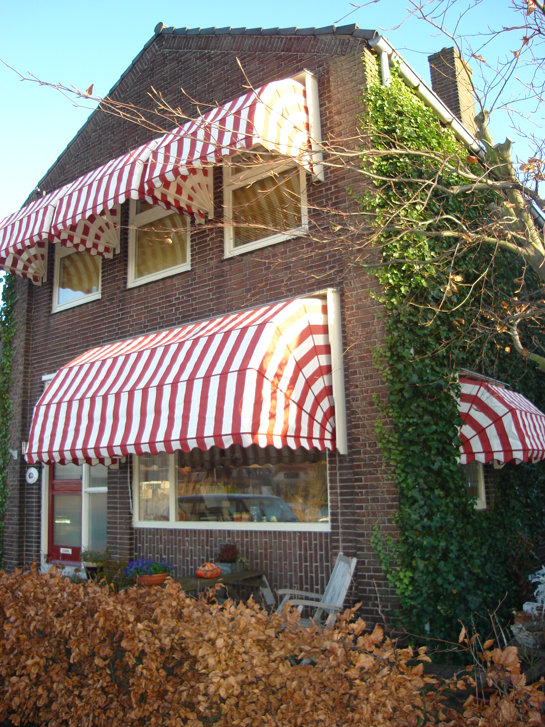 voorbeeld van markiezen